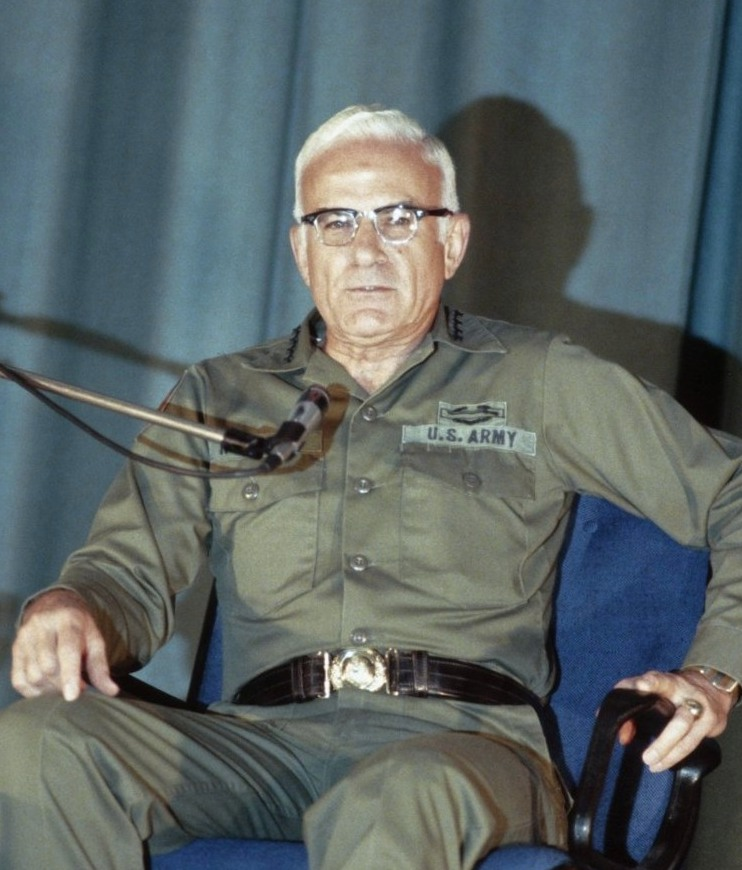 Openingsceremonie NAVO oefening " Autumn Forge " in Ramstein ( West Duitsland ); opperbevelhebber generaal Rogers